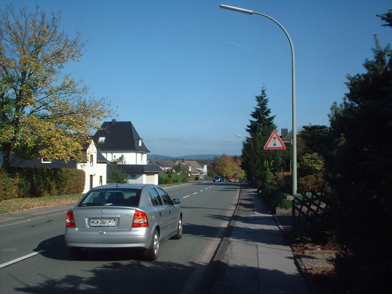 Rumbeck